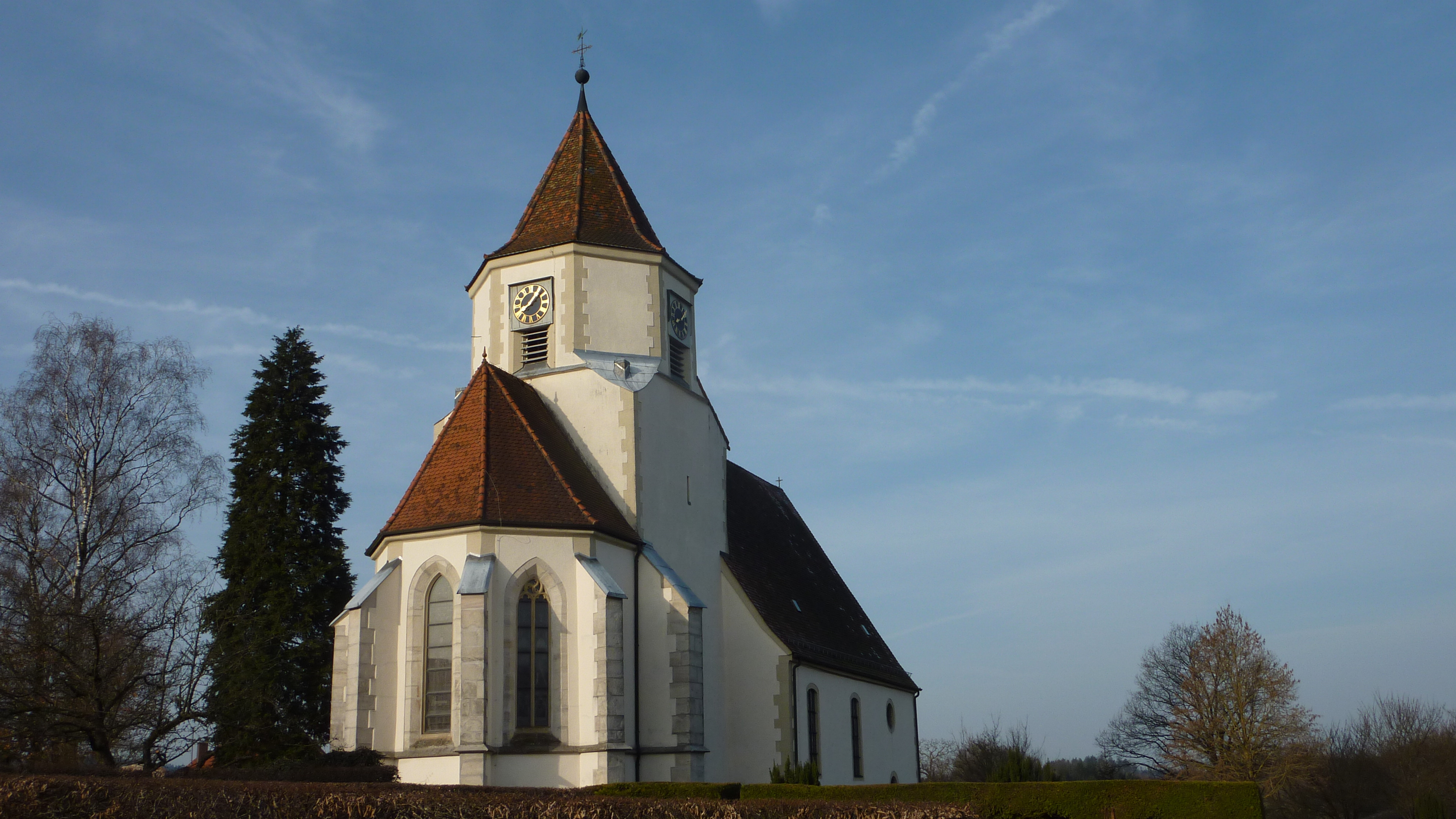 "Alte Kirche", Straßdorf, Schwäbisch Gmünd